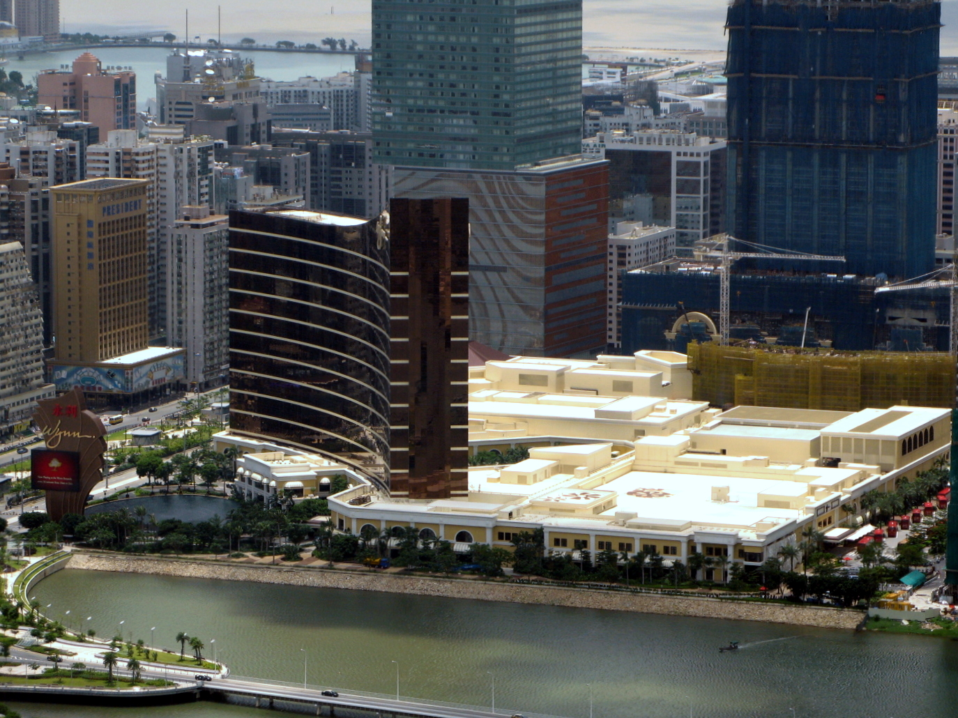 Wynn Macau Resort Overview